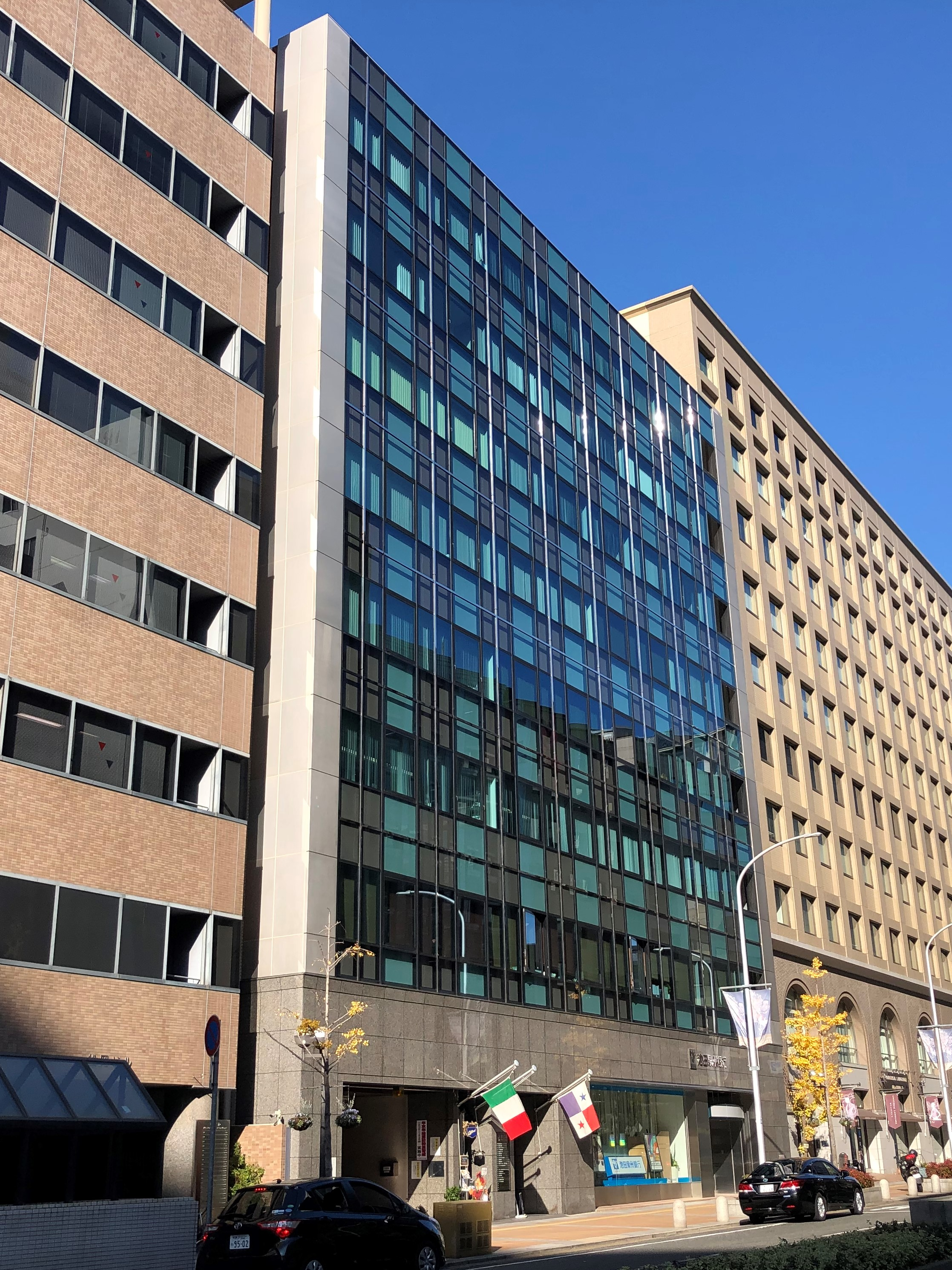 神戸市の山本ビル